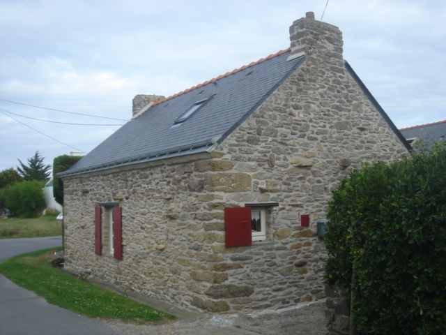 Anciennes longère (petite maison traditionnelle) rénovée et transformée en résidence secondaire à Belle-Île-en-Mer (56)